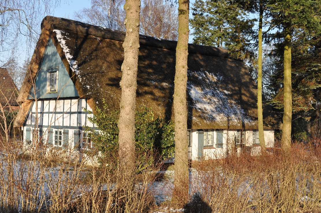 Oberndorf im Winter 2013